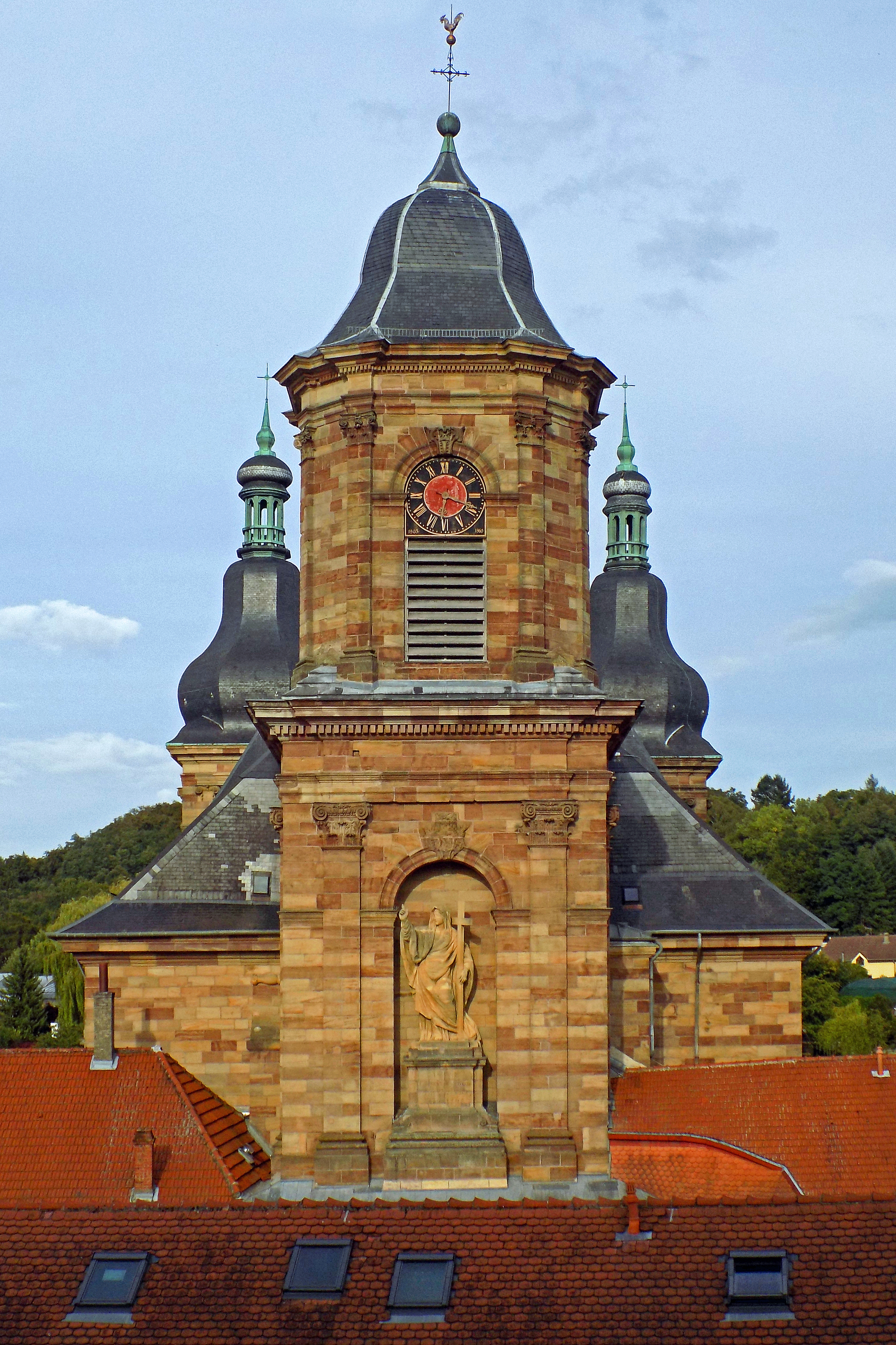 Abbatiale Saint-Nabor (vue de la tour de façade) de Saint-Avold (Moselle). Cette prestigieuse abbaye fondée au (VIe siècle) a été reconstruite au (XVIIe siècle) et (XVIIIe siècle); grandes orgues restaurées ; sur la façade de l'église abbatiale, statue représentant la Religion ou la Foi du sculpteur Pierre-François Le Roy (1739-1812) provenant du portail de Blondel de la cathédrale Saint-Étienne de Metz.